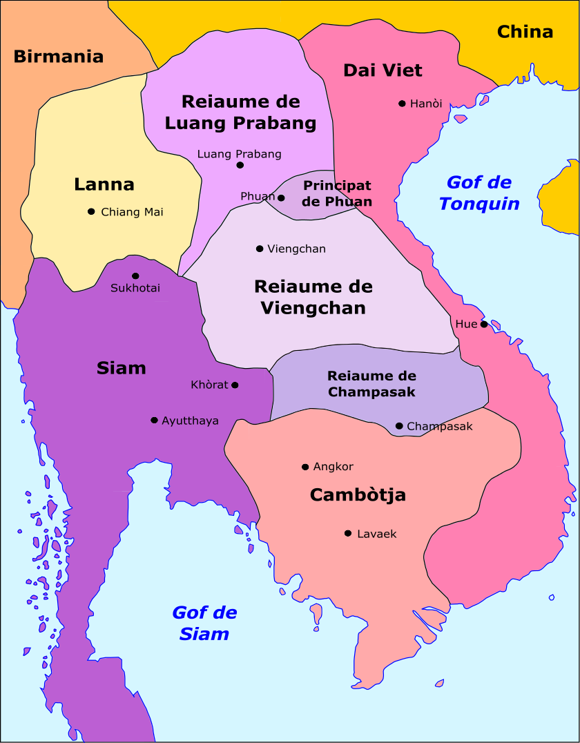 Division territòriala d'Indochina vèrs 1750.